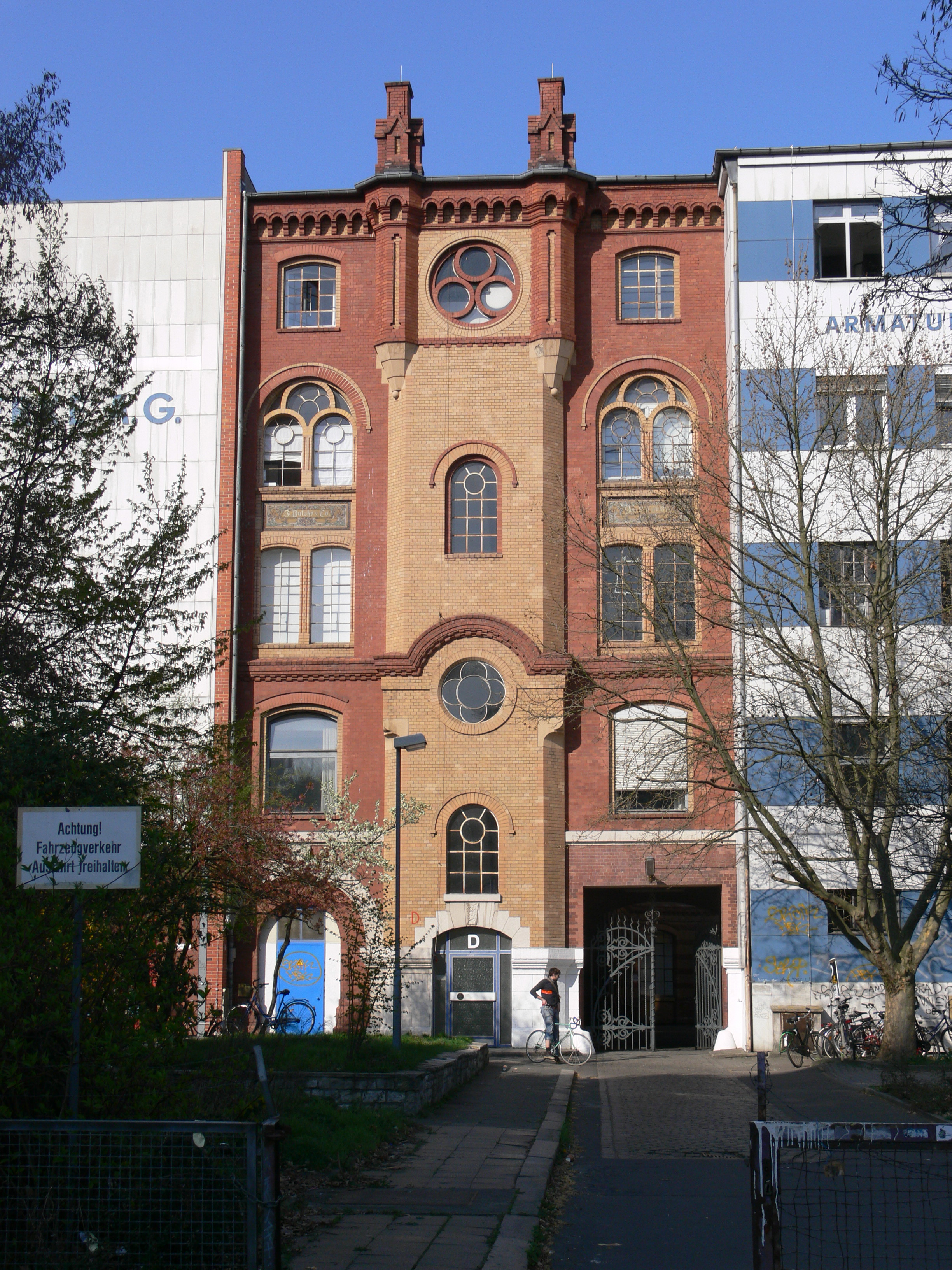 Berlin-Kreuzberg, Ritterstraße Aqua Carré, Haus D